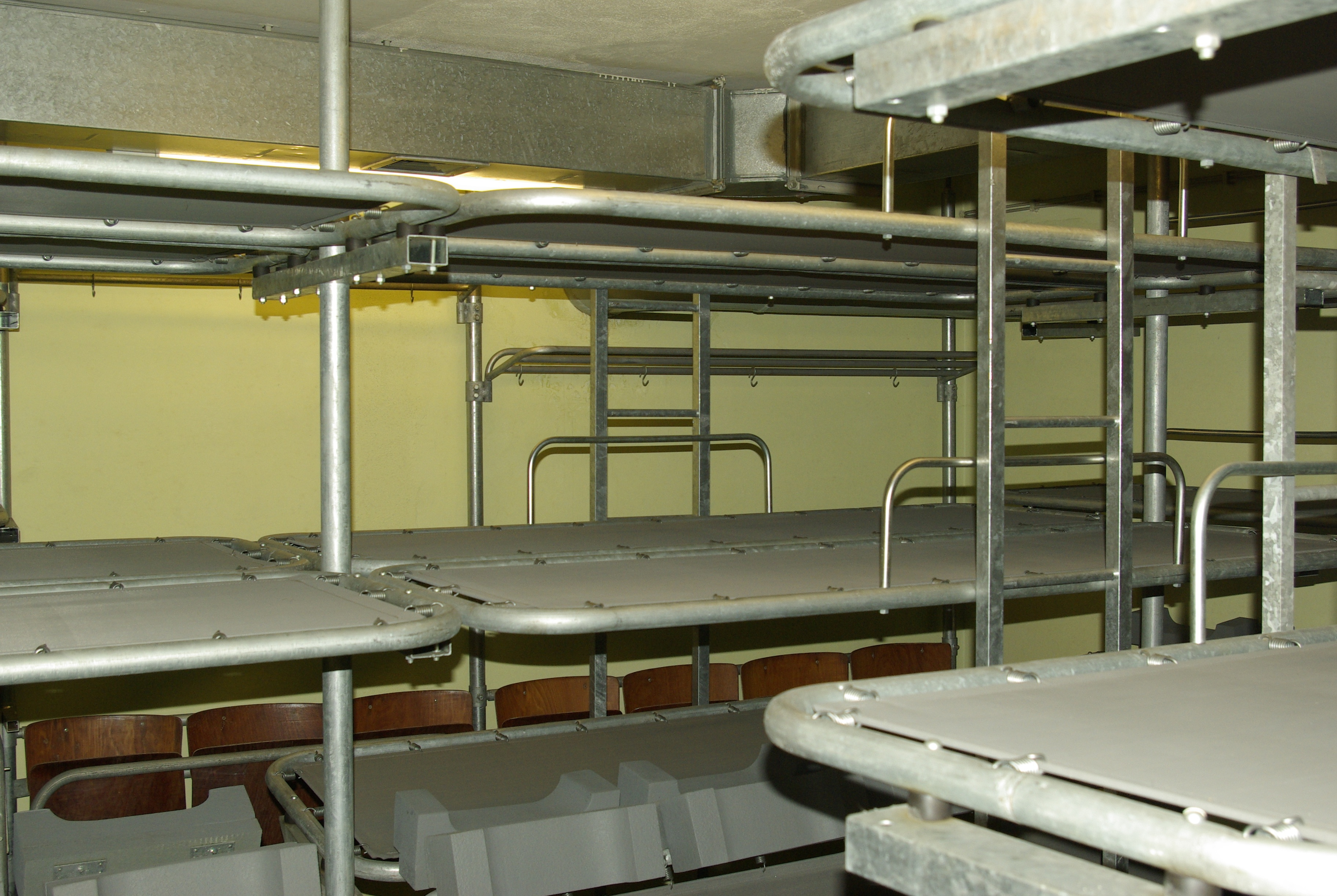 Waffenhof-Bunker in Nürnberg, Sitz- und Liegeraum.